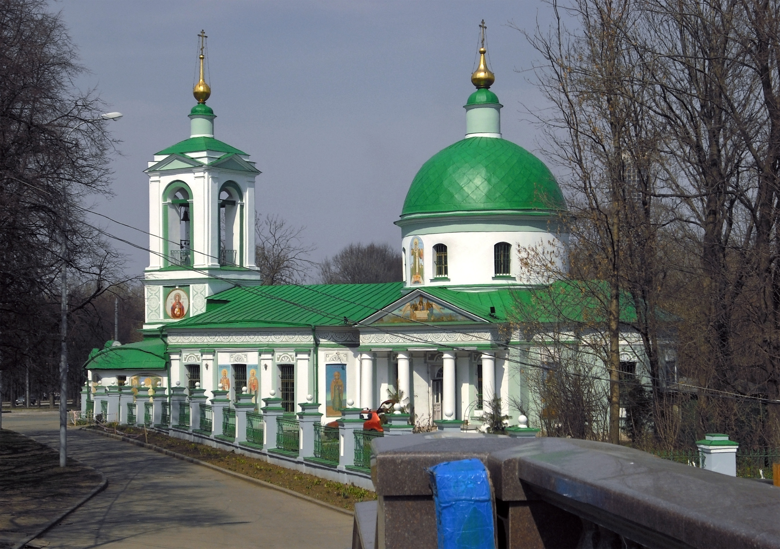 Pyhän Kolminaisuuden kirkko Vorobjovossa (Moskova, Venäjä)